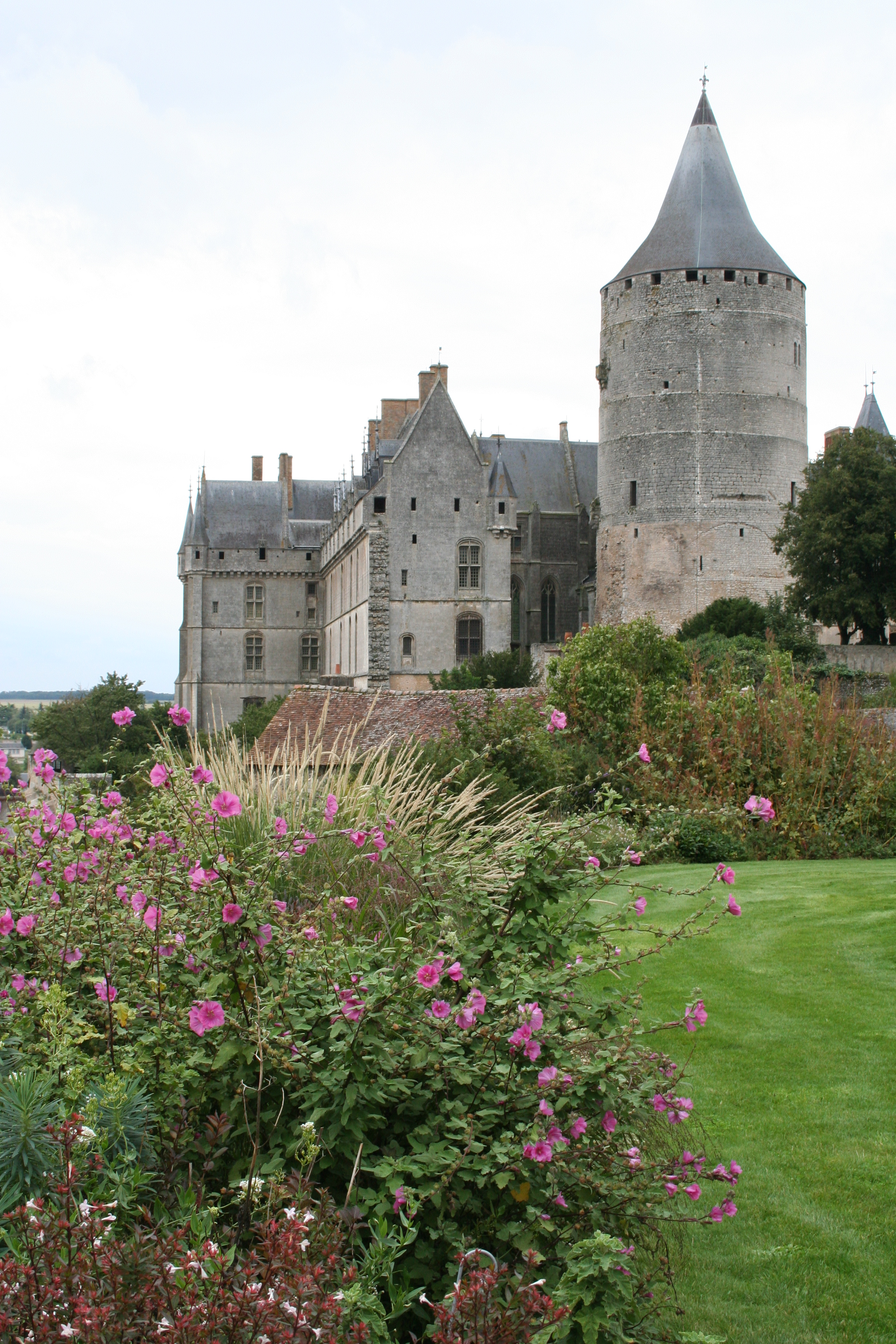 Le donjon de Châteaudun